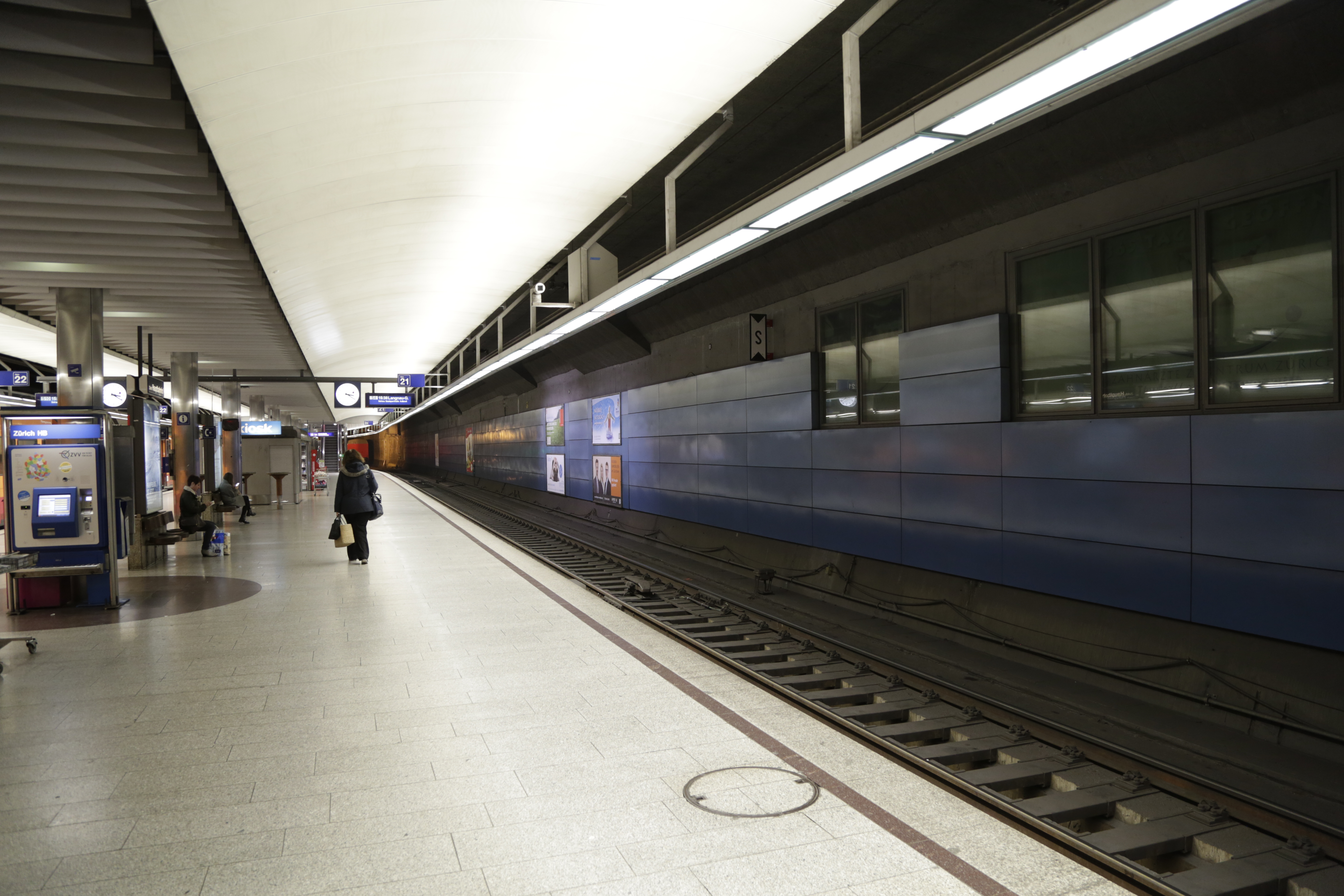 Impresionen aus dem SZU Bahnhof